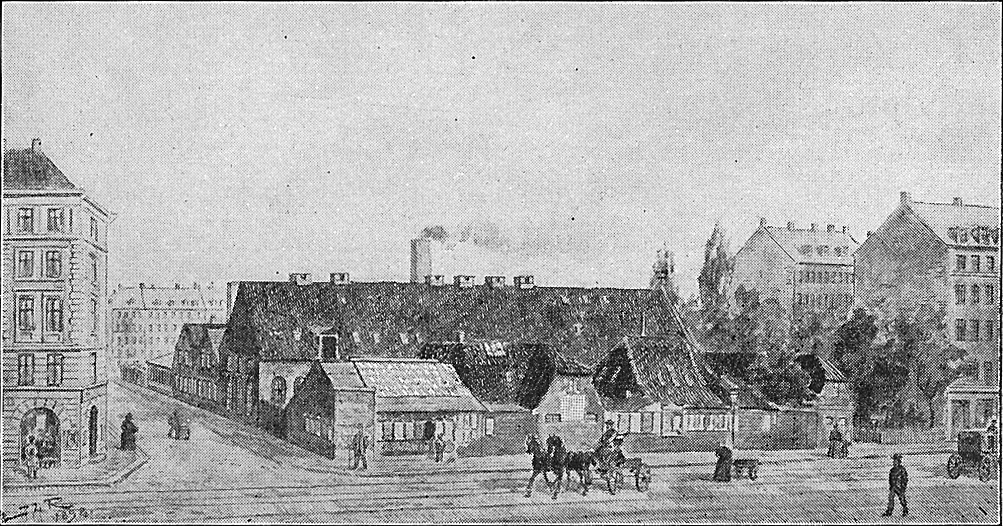 Anker Heegaards Fabrikker på Nørrebro i 1890'erne. Jernstøberiet blev anlagt i 1828 af Mathias Anker Heegaard (1776-1837). Ved faderens død i 1837 overtaget af sønnerne Christian August Heegaard og Steffen Peder Anker Heegaard